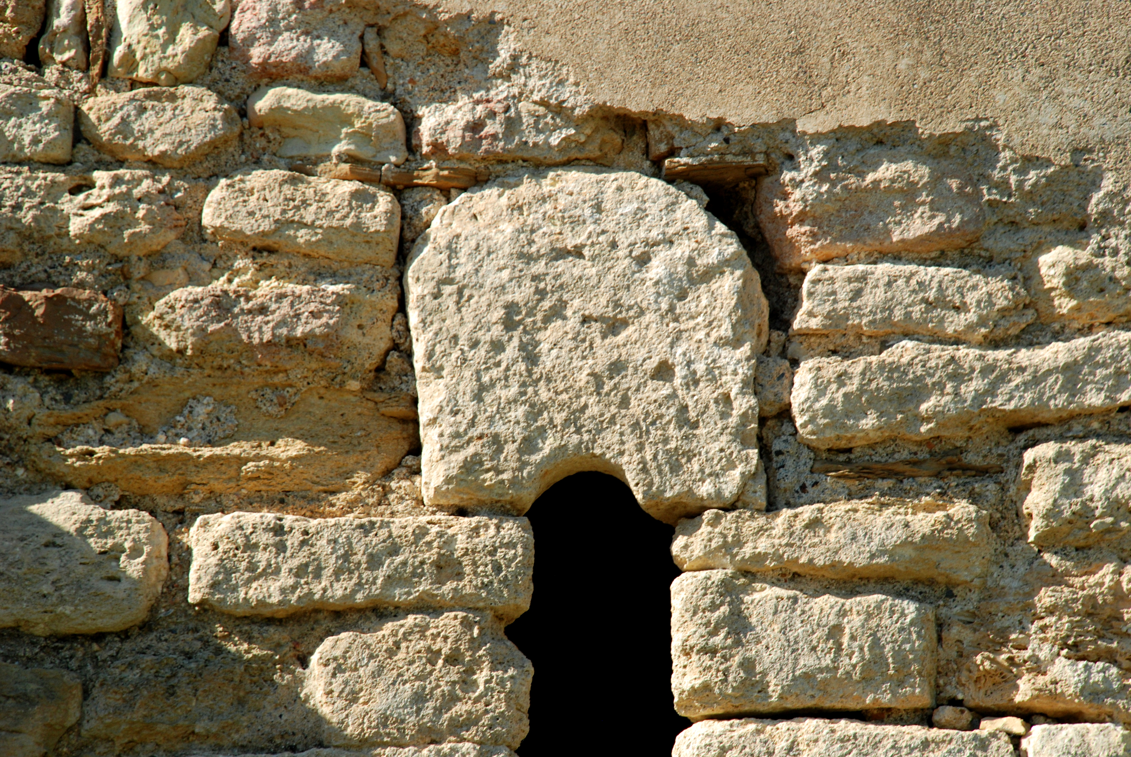 France - Languedoc - Hérault - Roujan - chapelle Saint-Nazaire - arc monolithe .